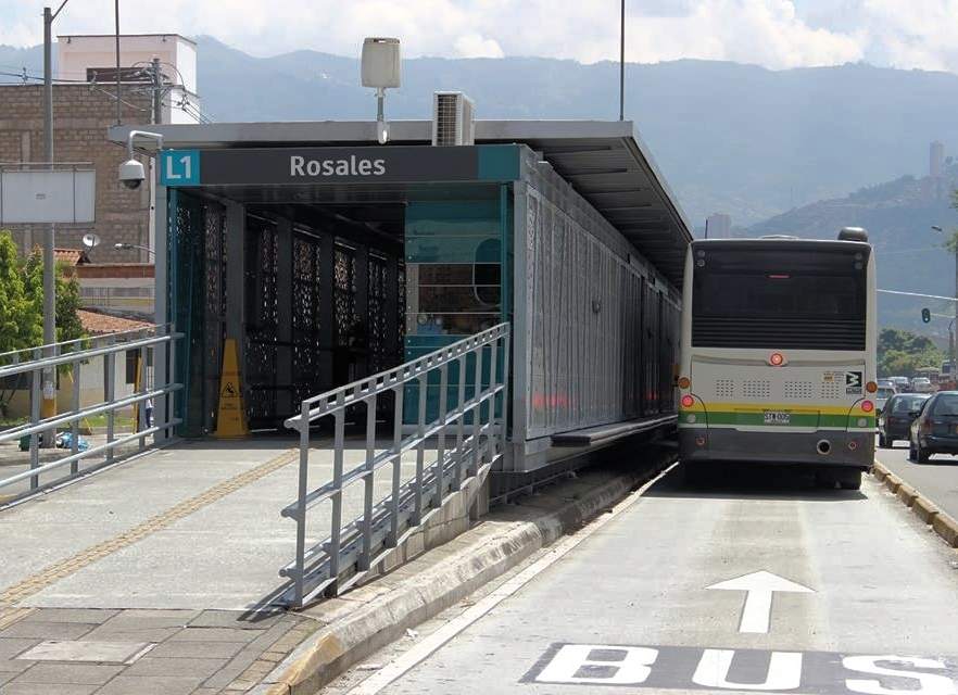 Estación Rosales (Metro de Medellín)